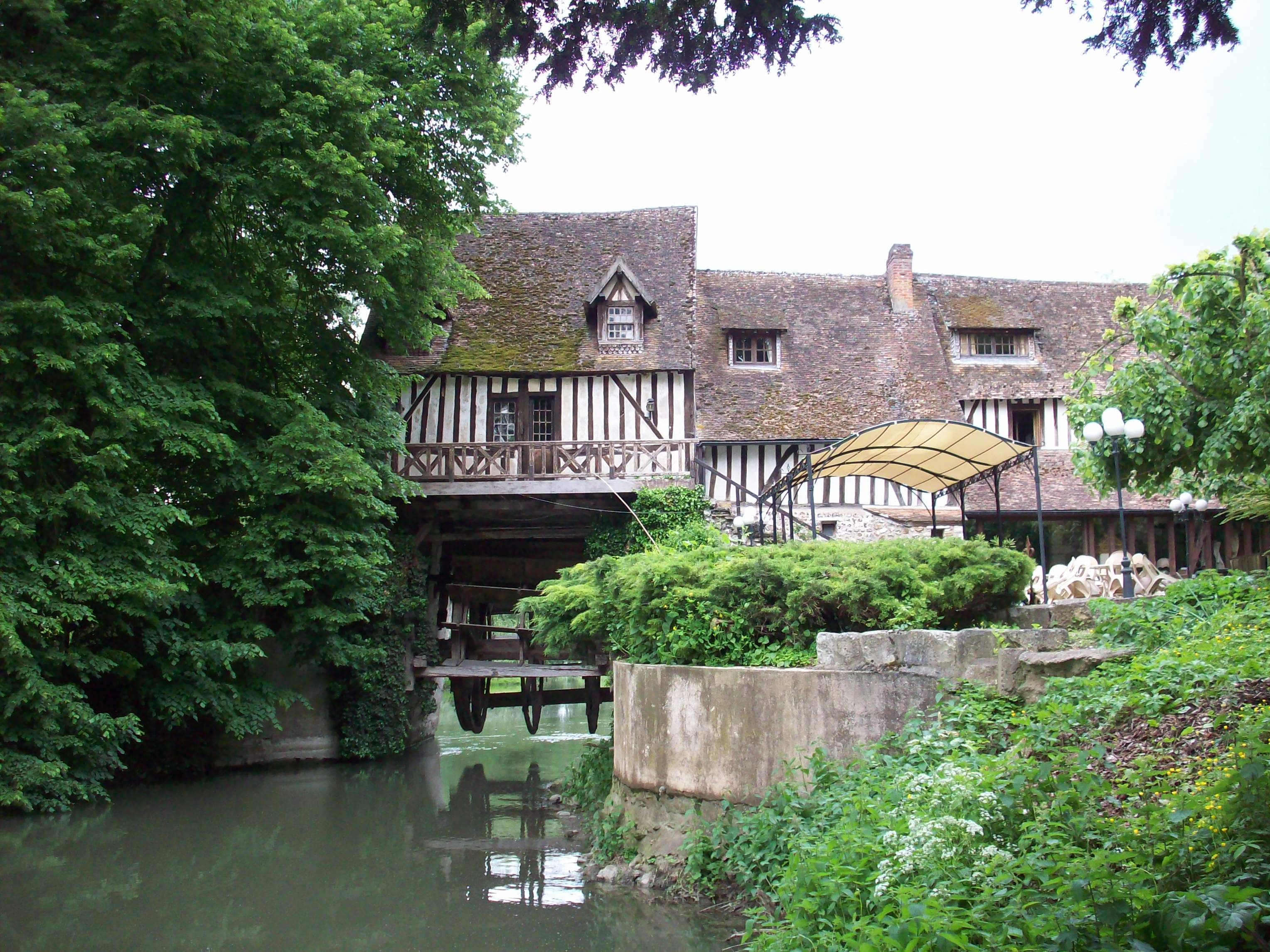 Vue du moulin et de sa roue relevée du cours d'eau